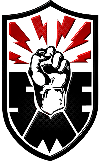 Logotipo del Sindicato Mexicano de Electricistas